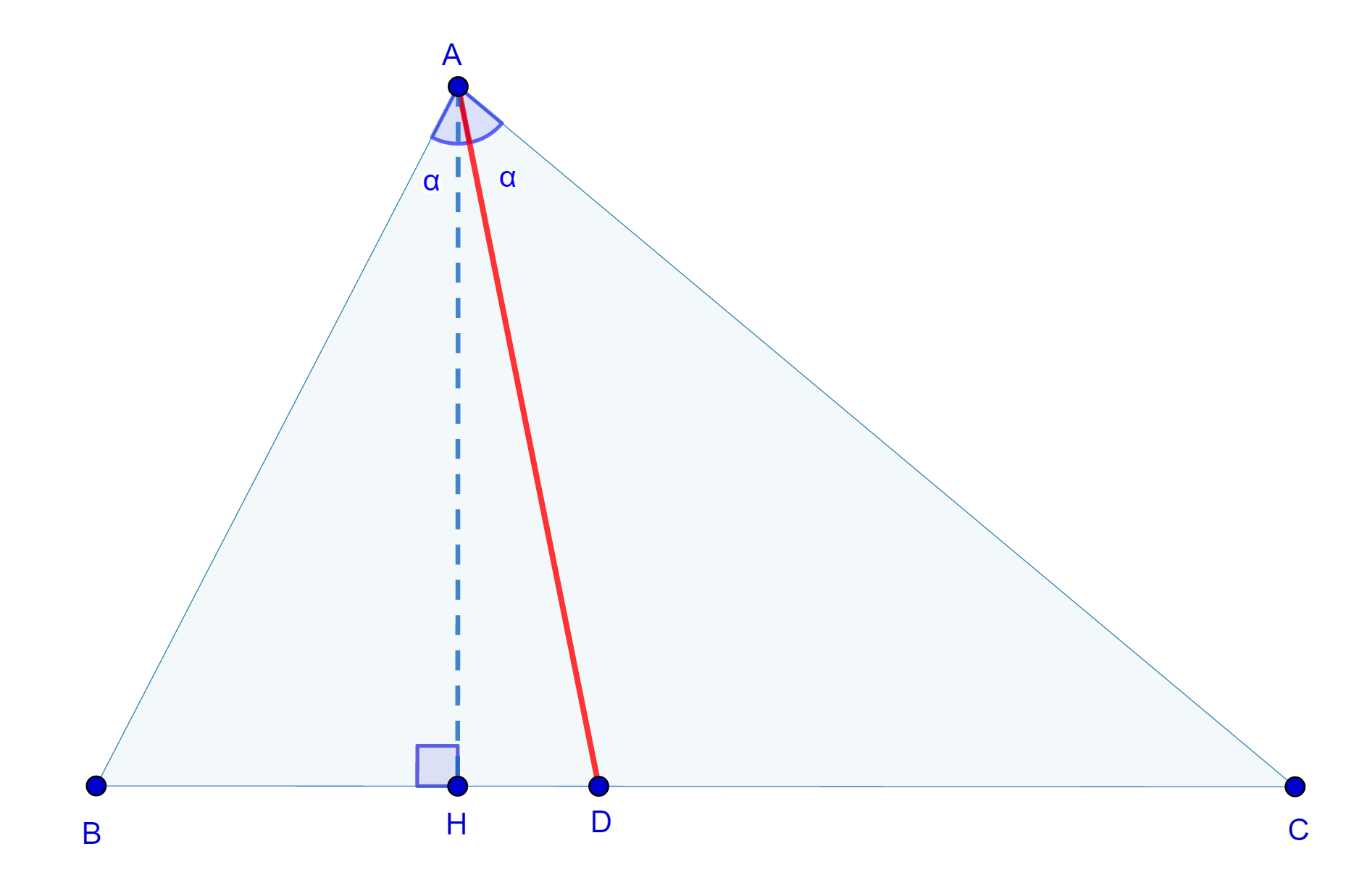 Доказательство теоремы о биссектрисе методом площадей